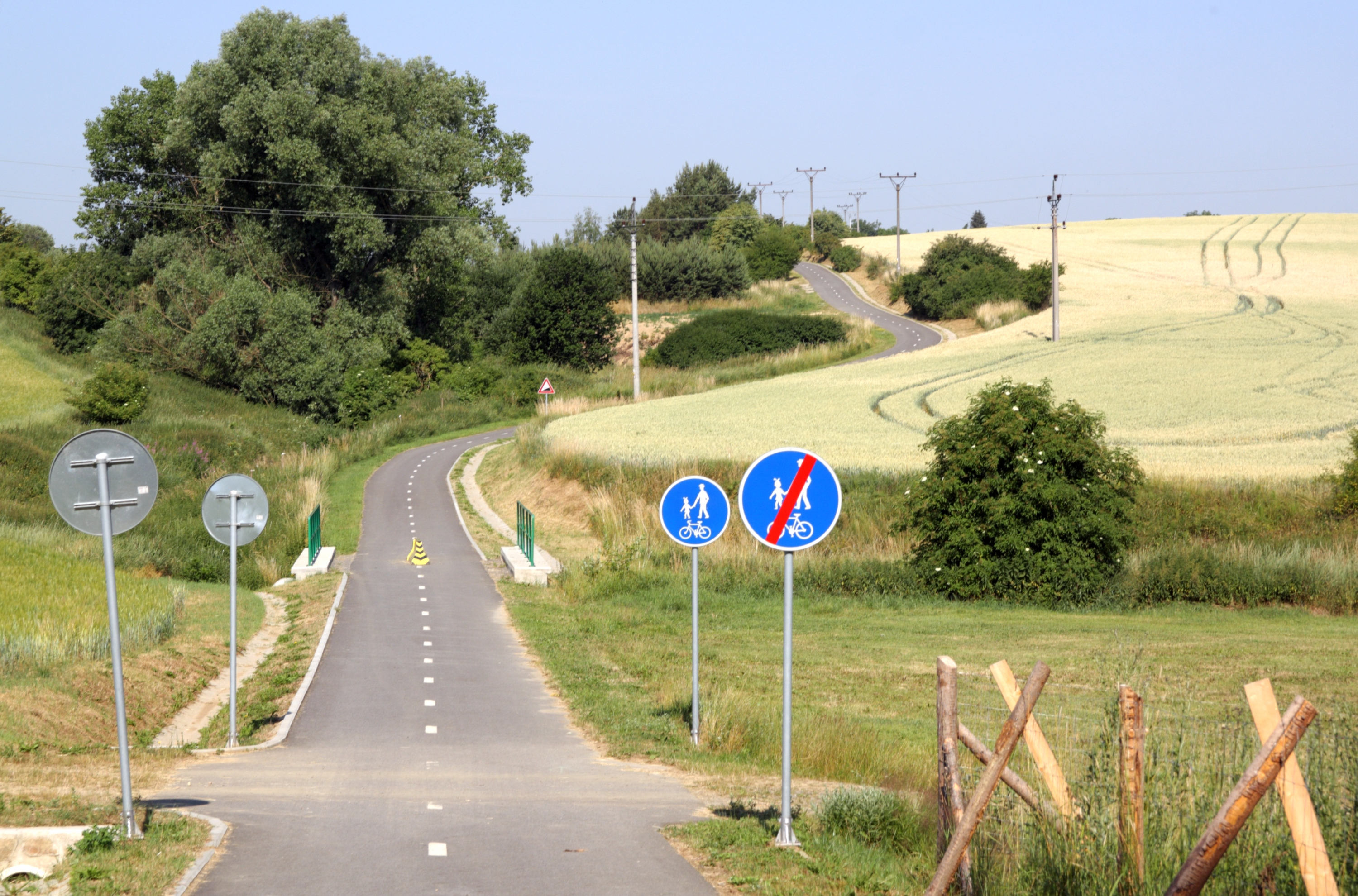 Cyklostezka Jihlava – Třebíč – Raabs mezi Červeným mlýnem a Petrovicemi.